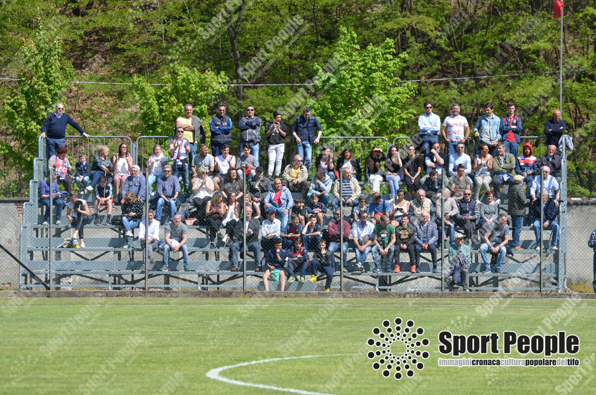 Tribuna minore dello stadio Alfredo d'Albertas di Gozzano (NO) durante il match Gozzano-Varese del 23-04-2017, valido per il campionato di Serie D-Girone A